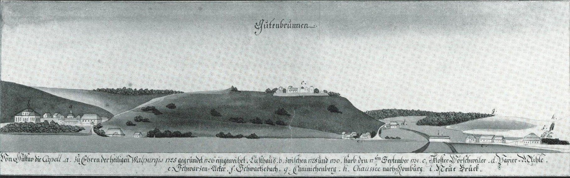 Kloster Wörschweiler im 18ten Jahrhundert